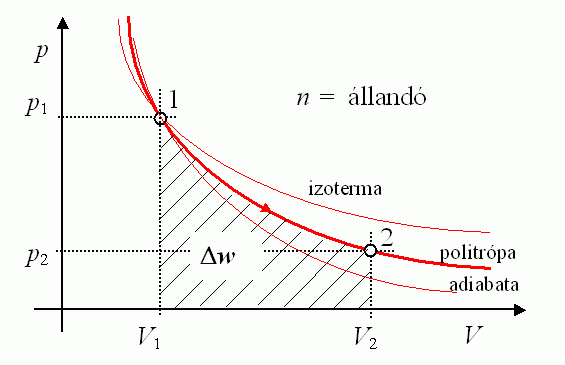 Politropikus állapotváltozás térfogati munkájának értelmezése